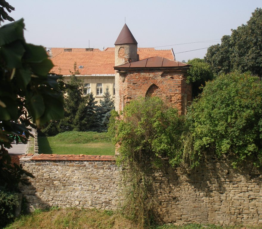 Mesto Prešov zvyšky mestských hradieb